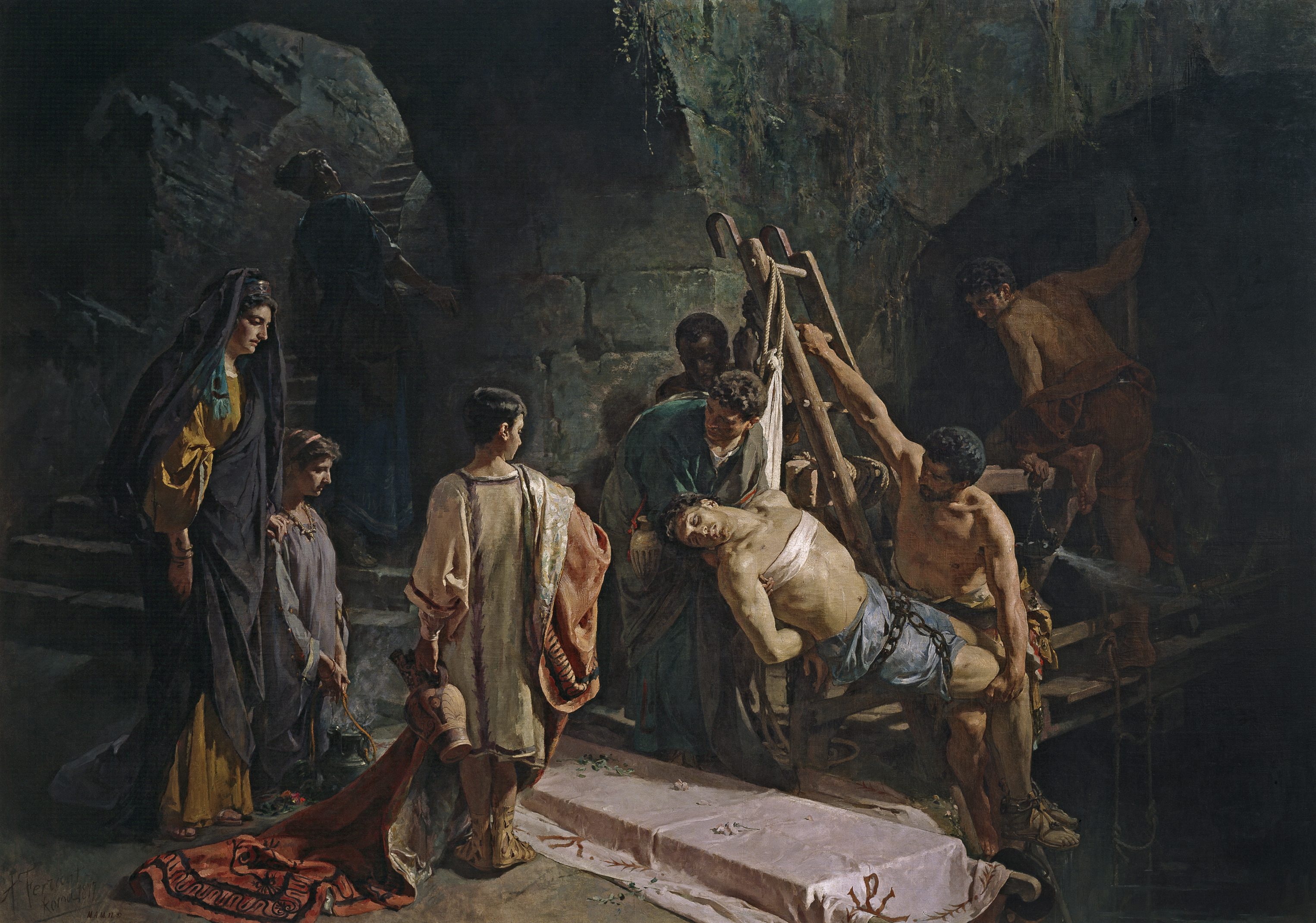 El lienzo representa el entierro del mártir San Sebastian. El emperador Maximiano mandó que lo azotaran hasta morir, y los soldados, después de matarlo, arrojaron su cuerpo a la Cloaca Máxima de Roma. Los cristianos recogieron su cadaver y lo enterraron en la Vía Apia, en las Catacumbas de San Sebastián. Murió en el año 288.